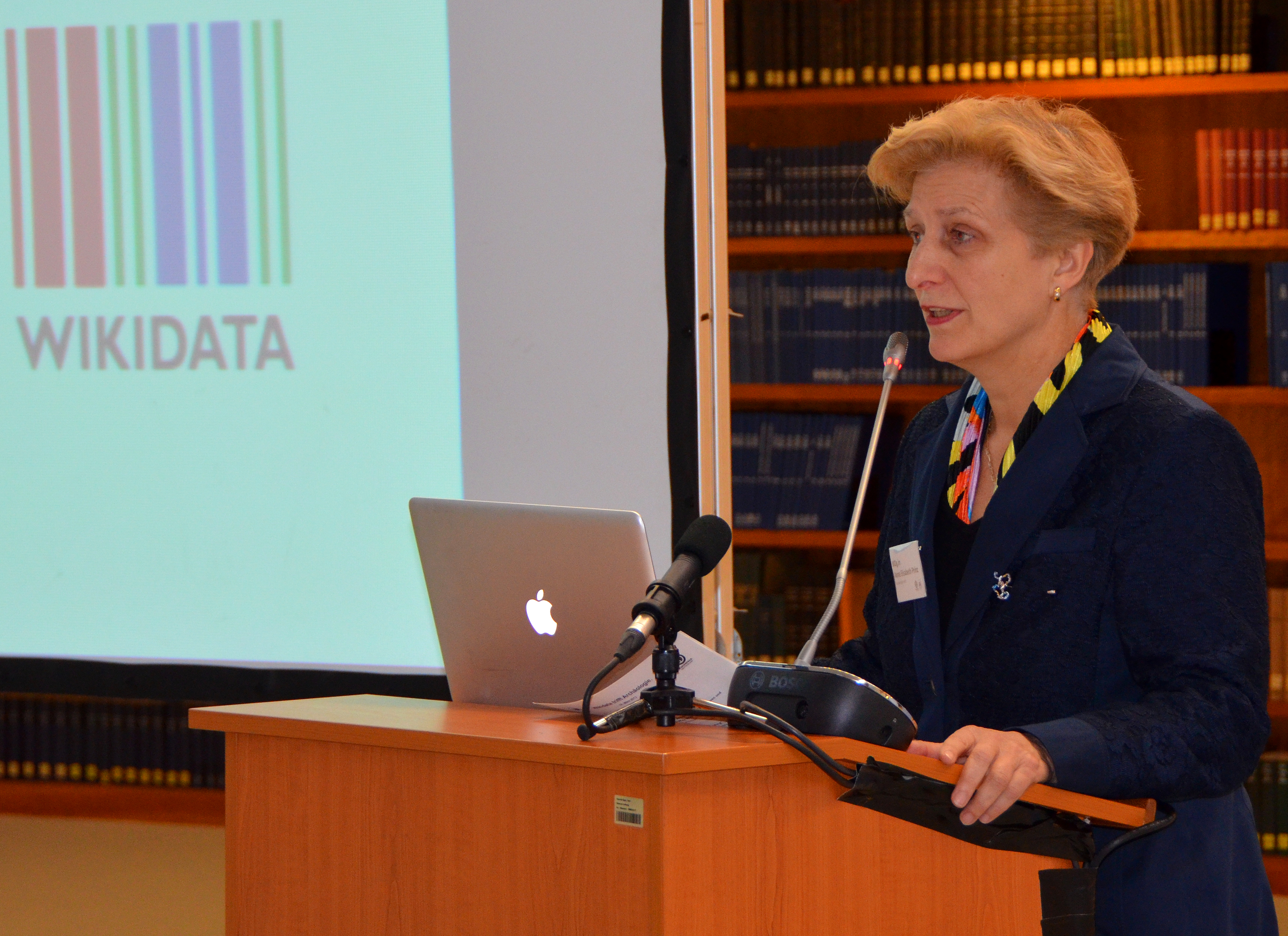 Dr. Anna Elisabeth Prinz, Ministerialdirigentin des Auswärtigen Amtes